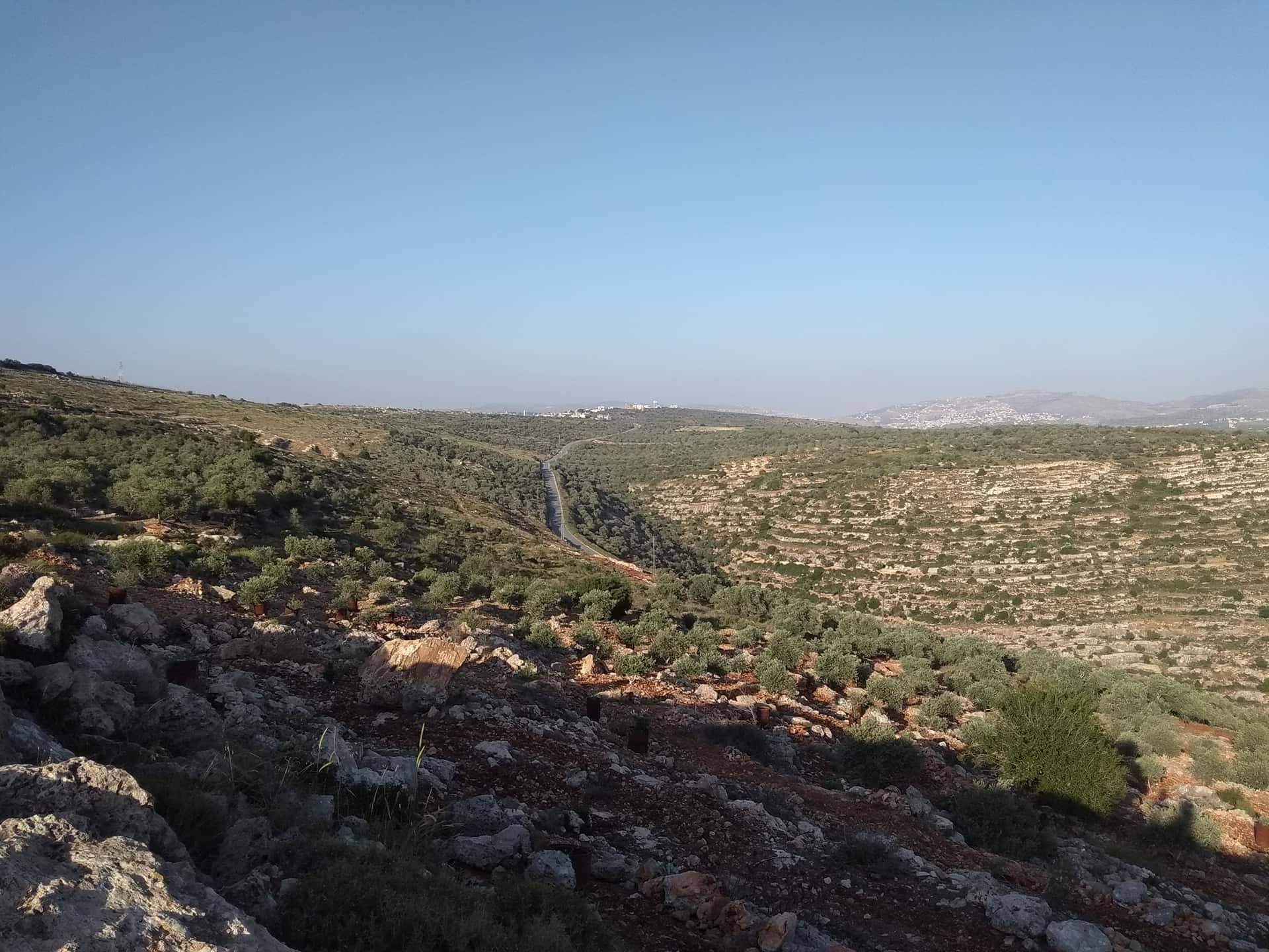 قرية اسكاكا من جهة مدينة سلفيت، وتظهر في الأفق يمينًا بلدة قبلان